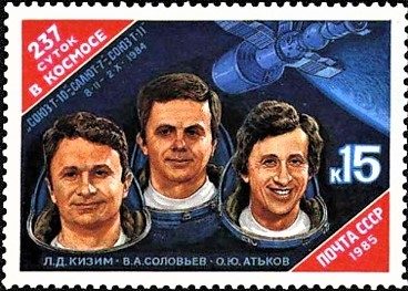 Космонавты СССР Кизим, Соловьёв, Атьков